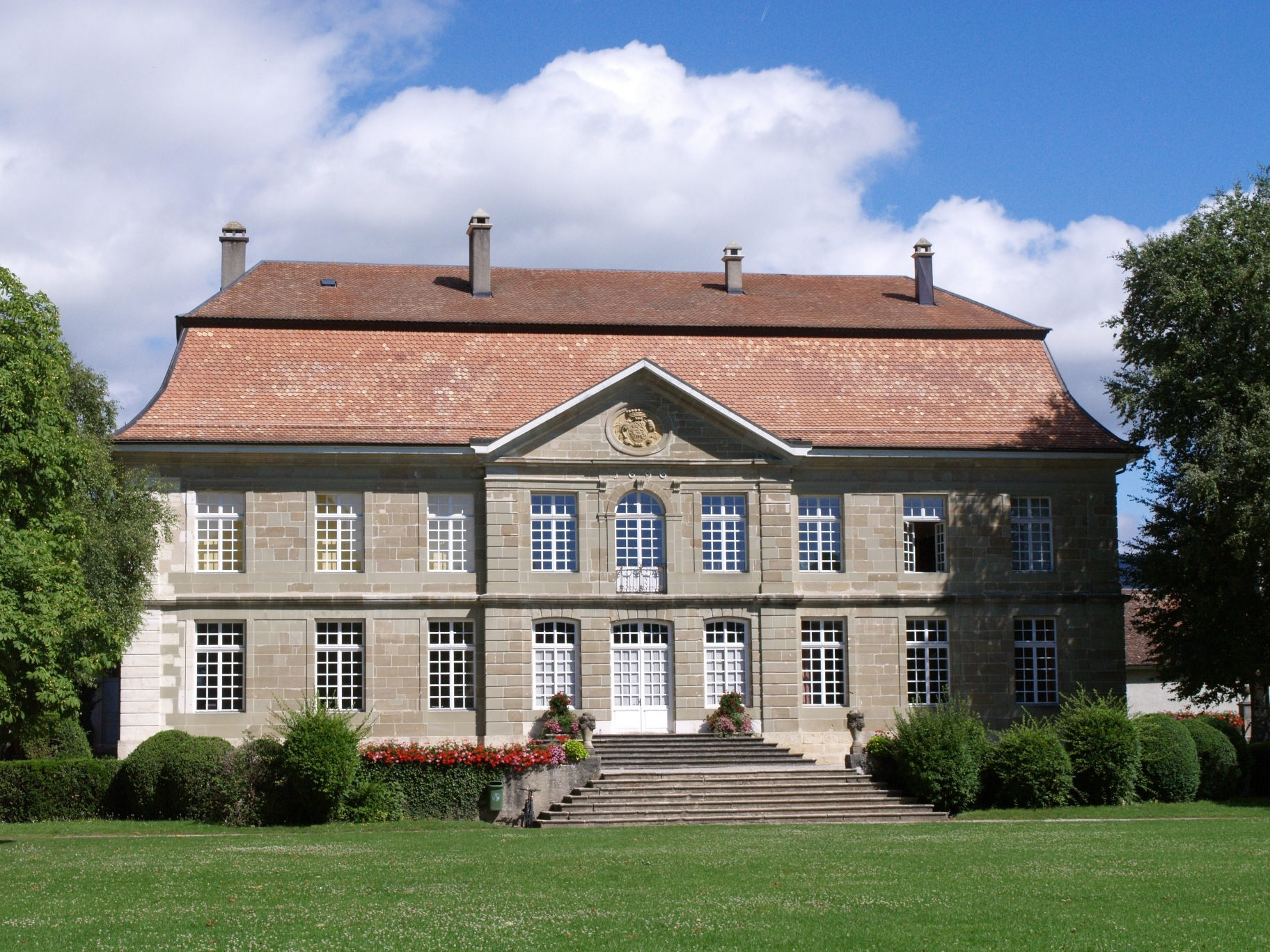 Le château de L'Isle